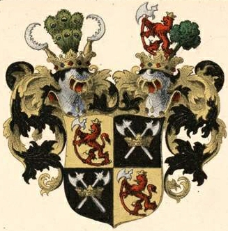 Uexkülli suguvõsa aadli- ja parunivapp